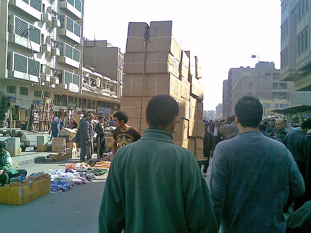 Jamhuria St., Baghdad